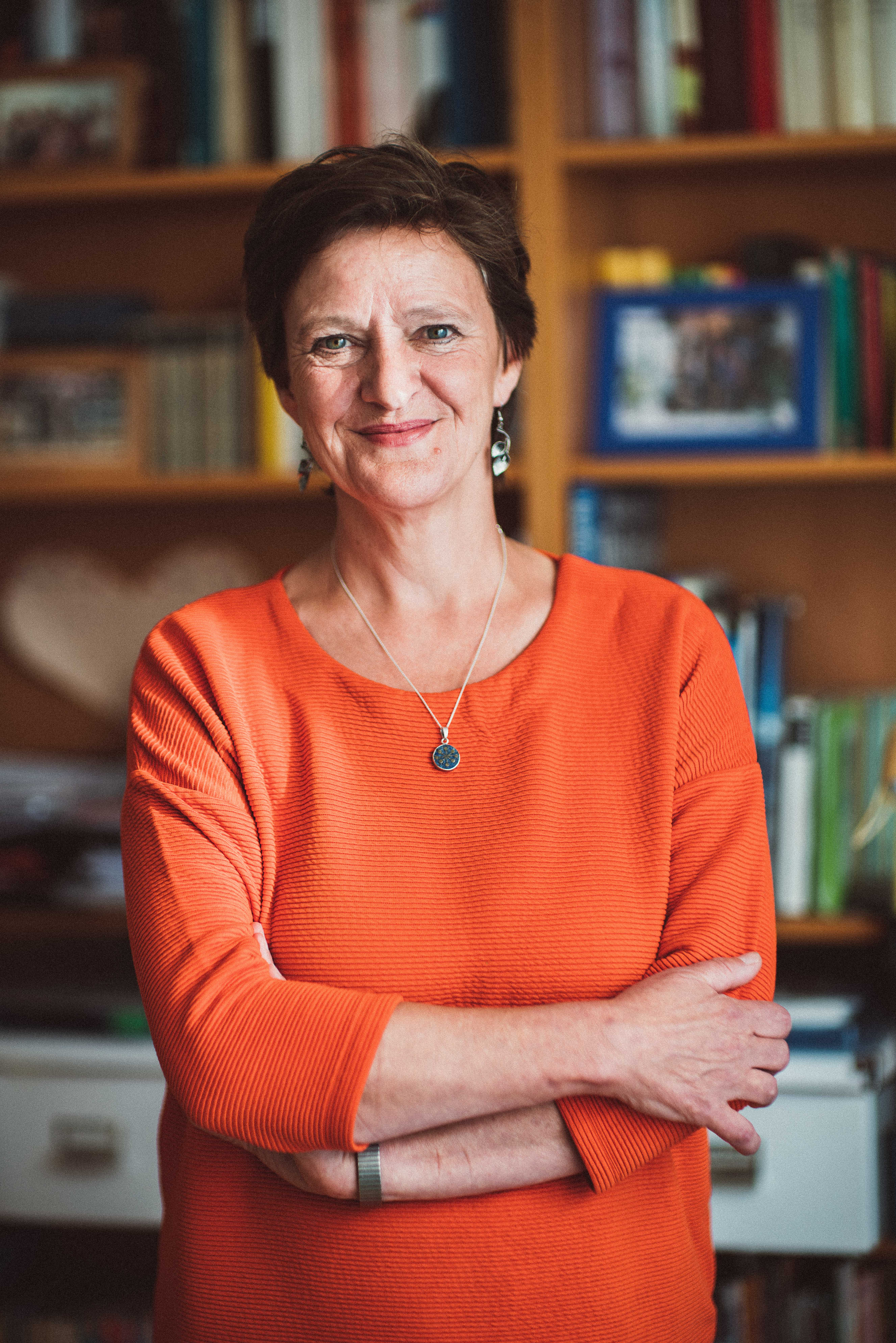 Die bekannte Autorin steht vor dem Bücherregal in ihrem Büro.